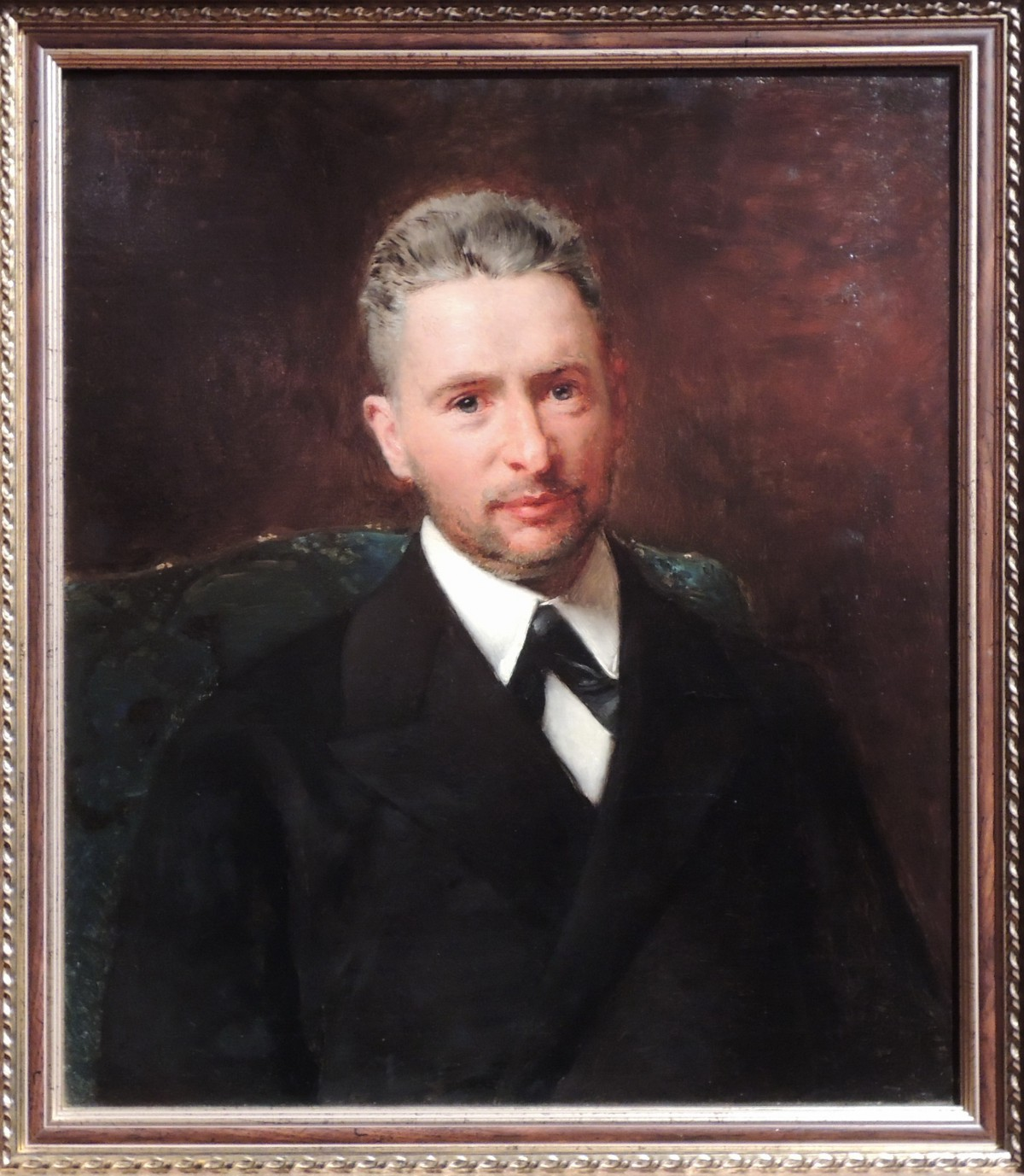 Выставка "Национальная портретная галерея", 2012.